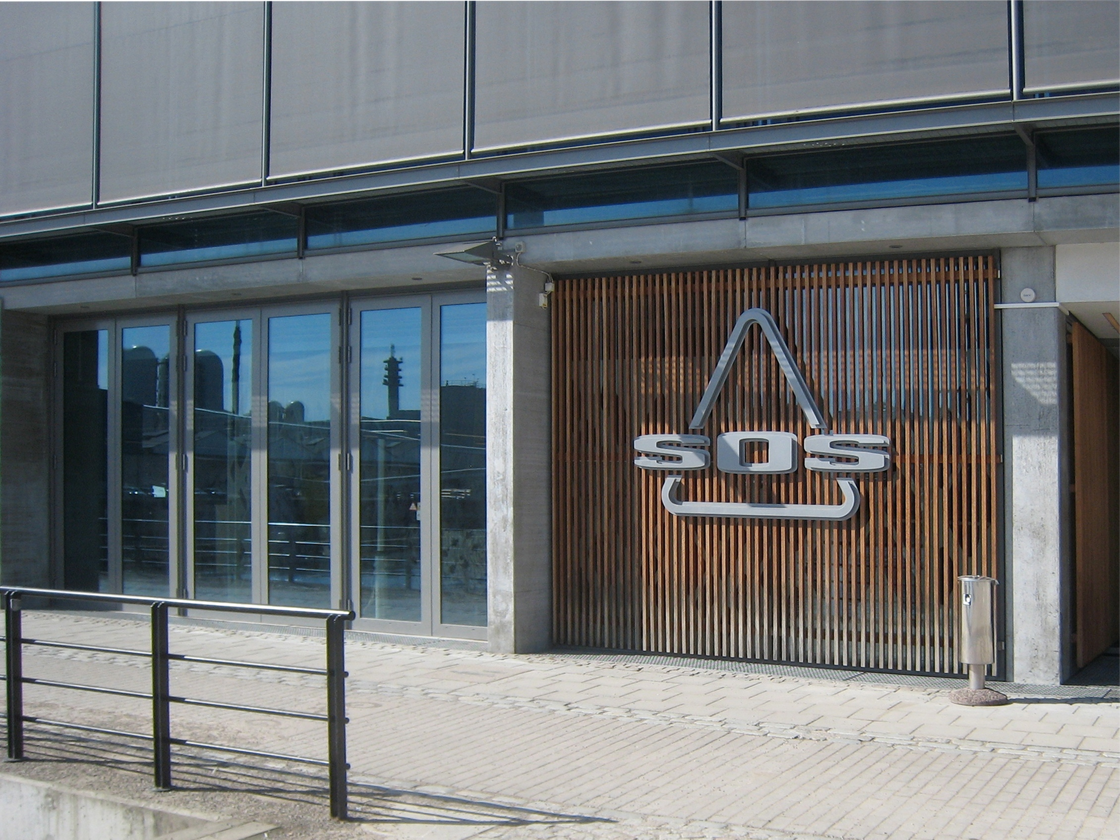 HQ of Sportswear of Sweden (SOS) at Östgötagatan 100, Södermalm Stockholm.